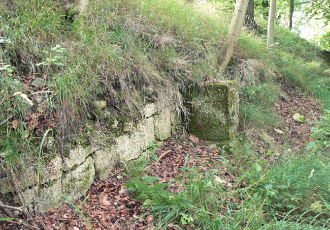 Überwachsener Mauerrest der Ringmauer der Burg Hausfreden